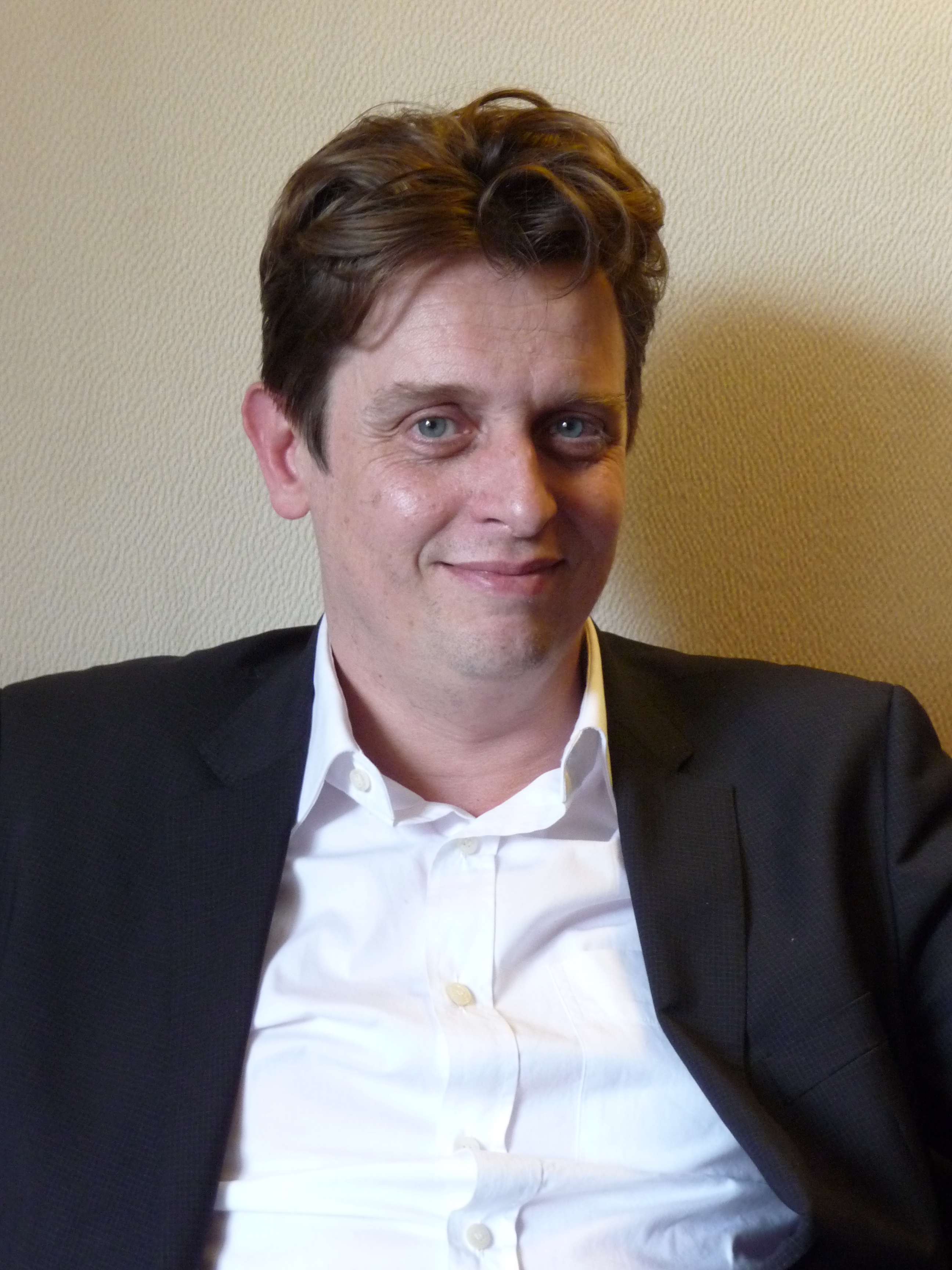 Henri Verdier